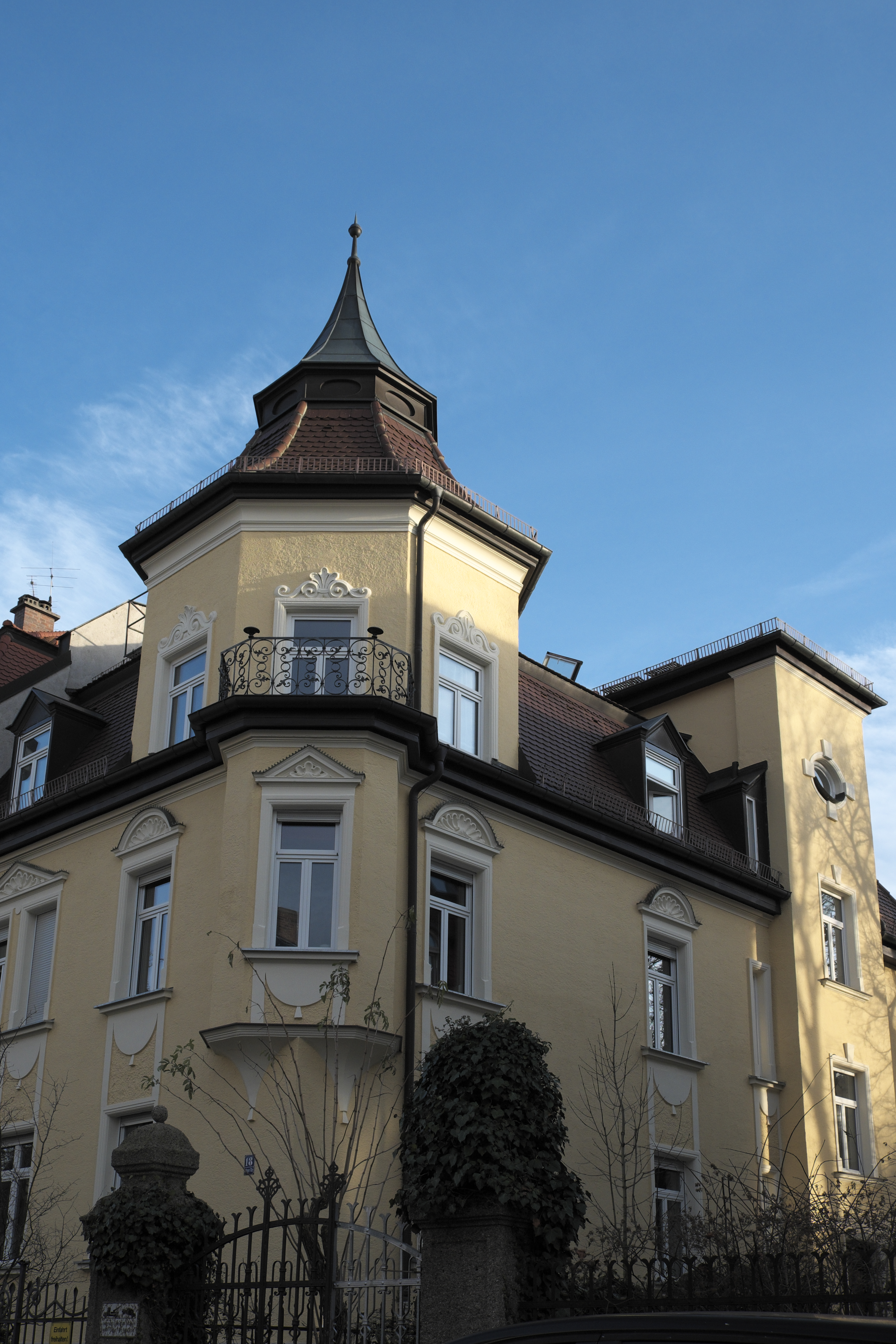 Neorenaissance-Villa in der Bothmerstraße 18 in Neuhausen im Stadtbezirk Neuhausen-Nymphenburg in München (Bayern/Deutschland)